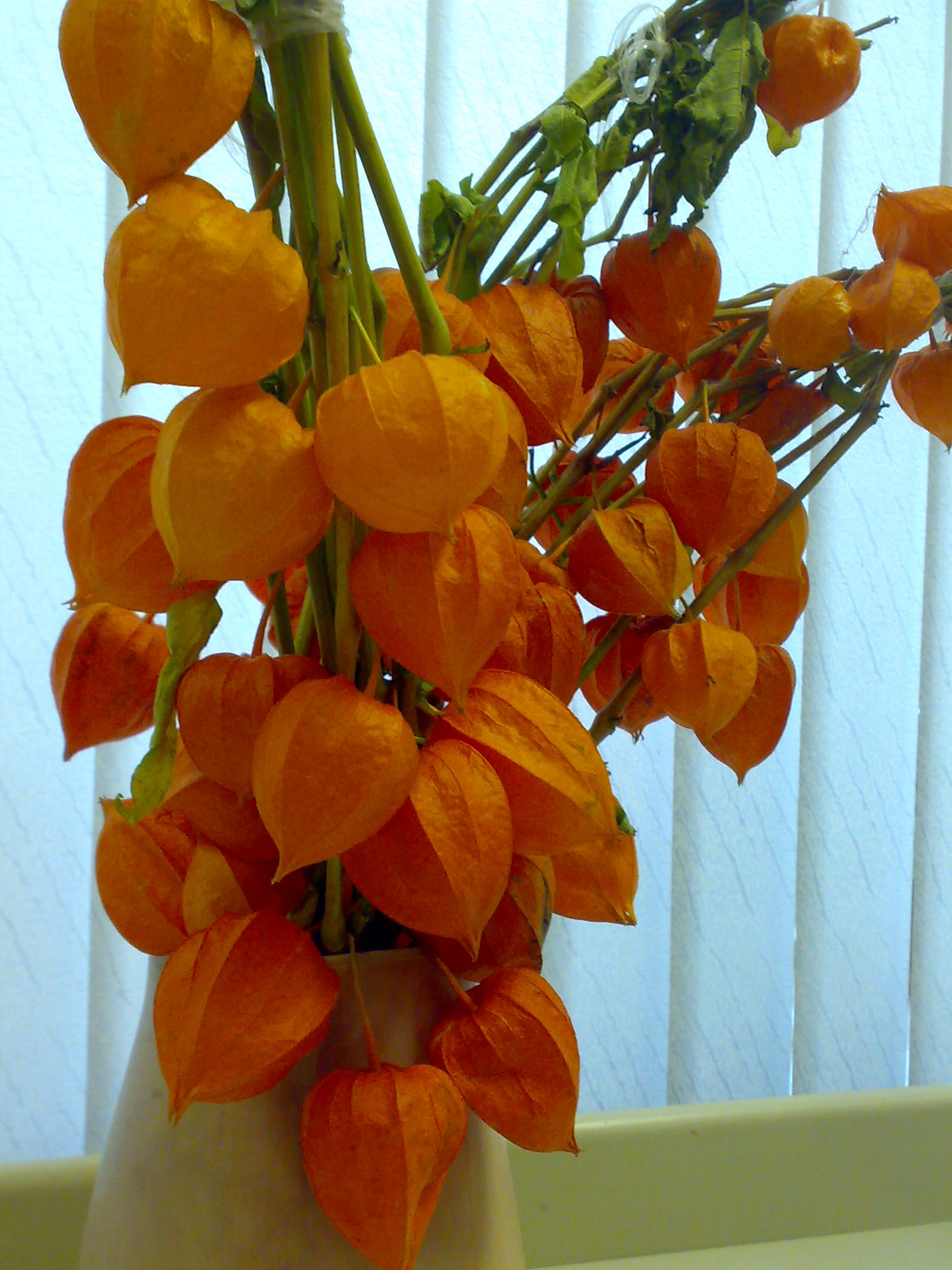 Букет из веток декоративного физалиса с плодами